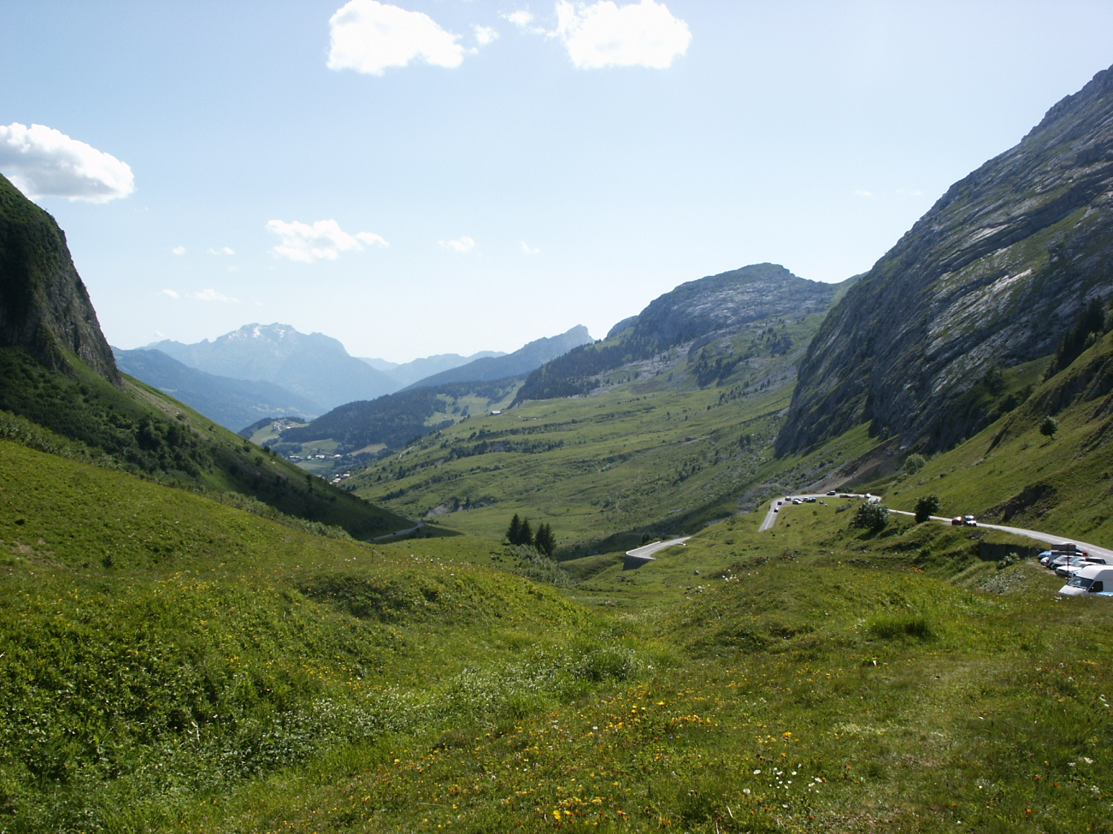 Vue du col de la Colombière